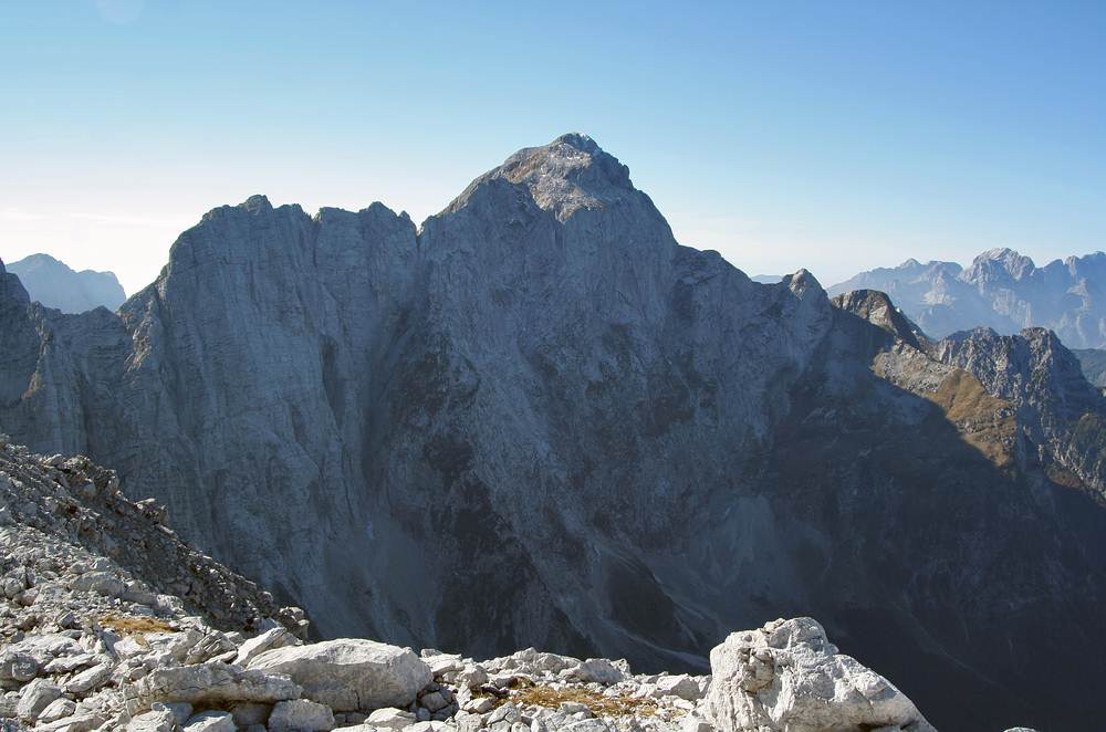 Severní stěna Mangartu